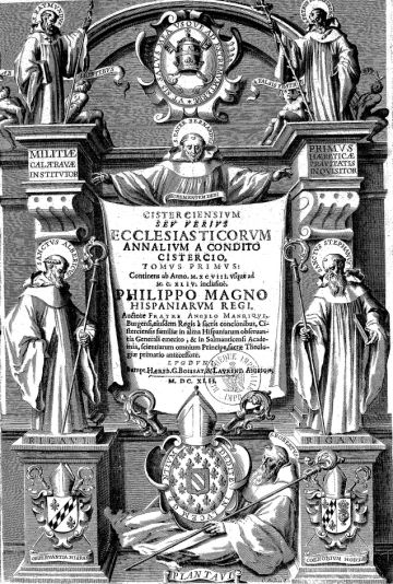 Illustration de couverture du tome I de Cisterciensium seu verius ecclesiasticorum annalium a condito Cistercio